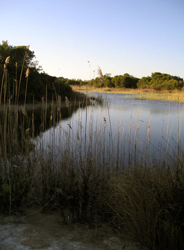 Mallada (Playa de la Dehesa, Valencia, España)